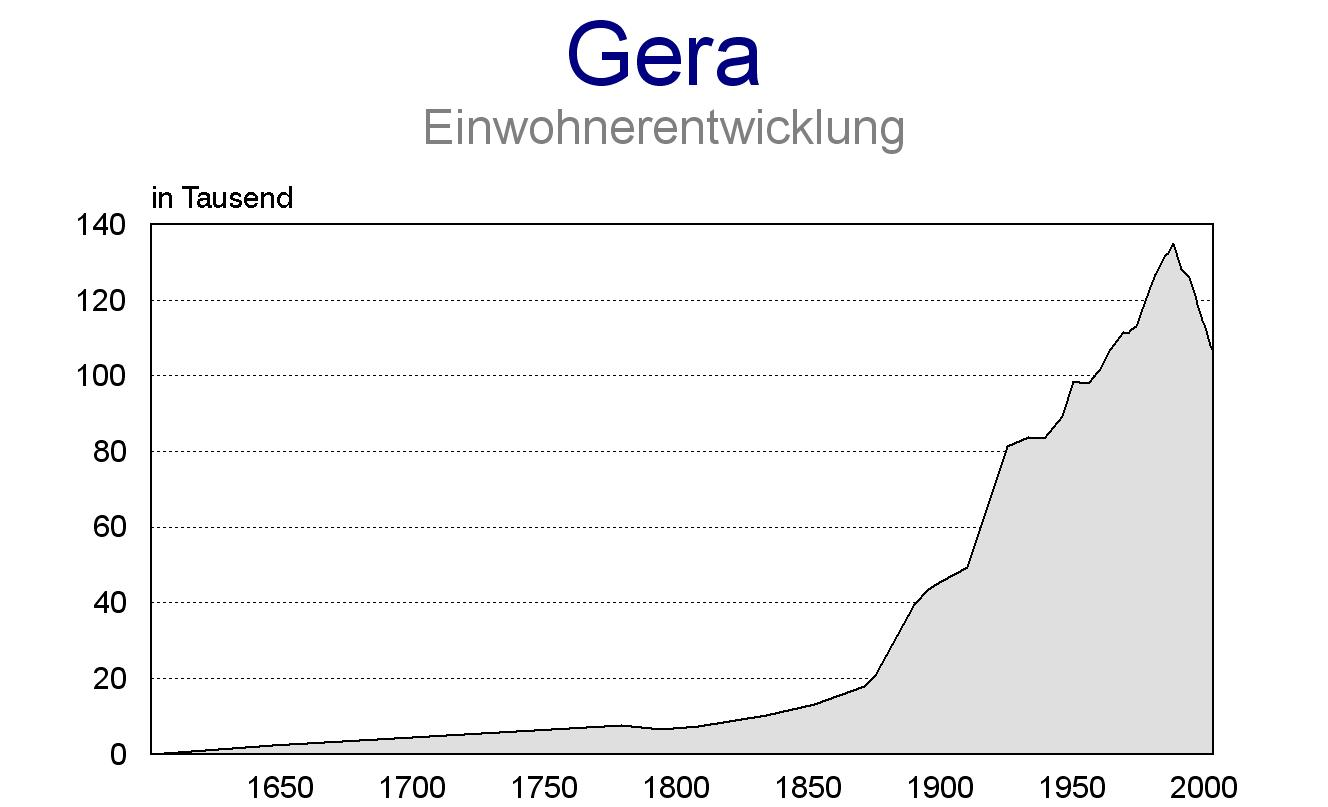 Einwohnerentwicklung von Gera.